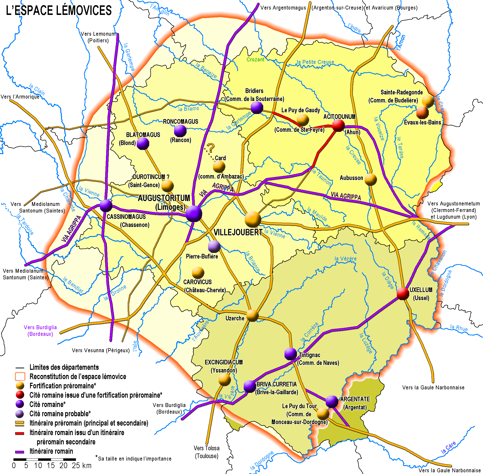 Reconstitutions de l'espace des gaulois Lémovices avant et après l'arrivée des Romains